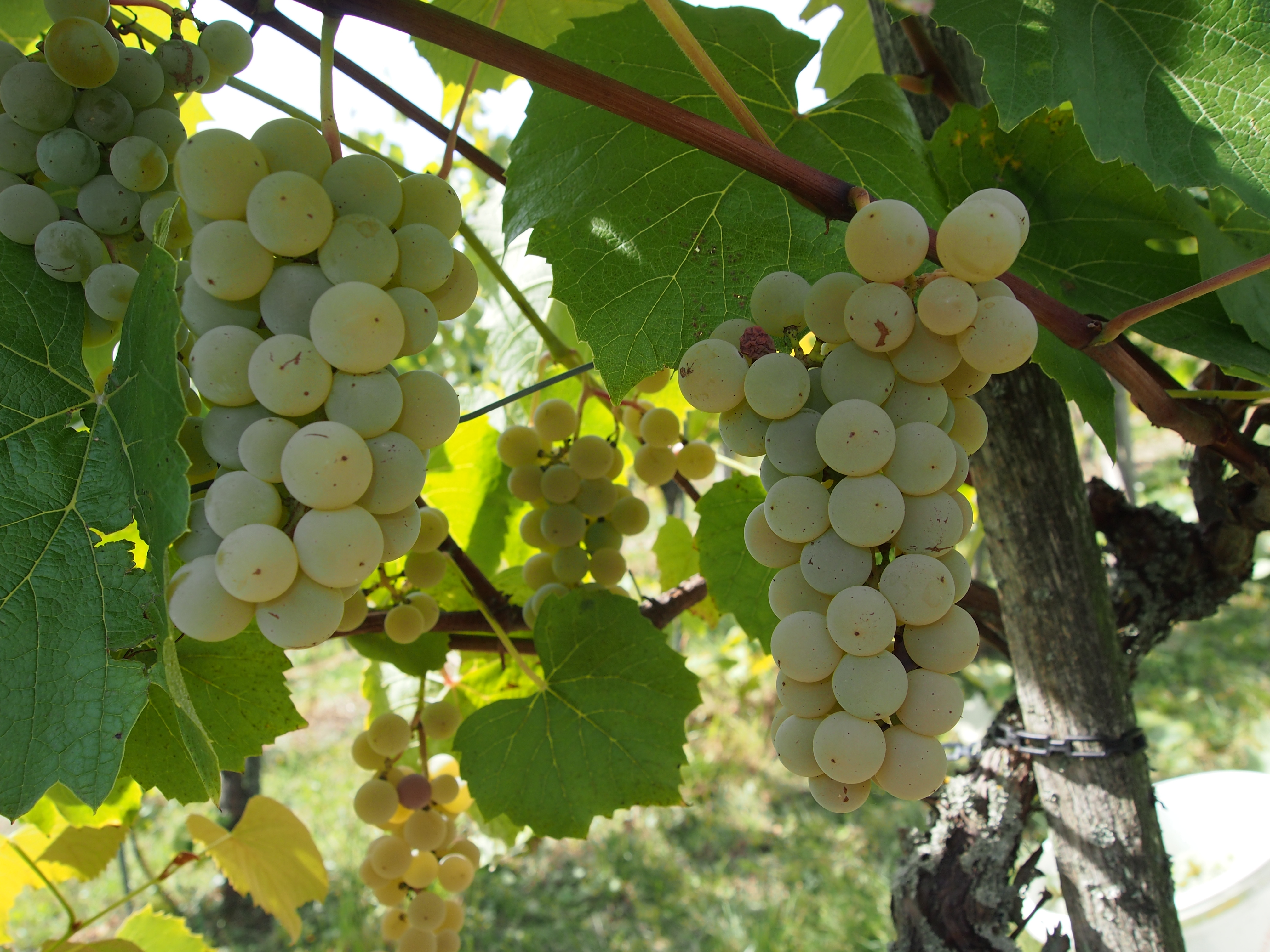 Noah Trauben kurz vor der Lese - Weiterverarbeitung zu Uhudler